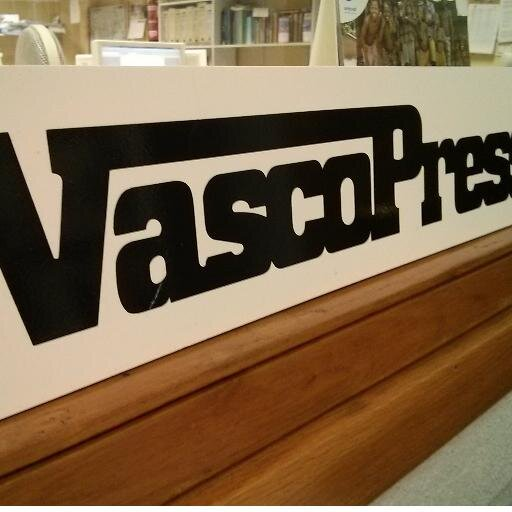 Redacción y logotipo de la agencia de noticias VascoPress